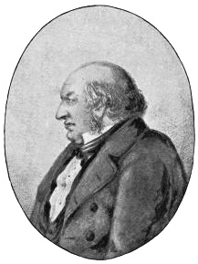 А.А.Шаховской